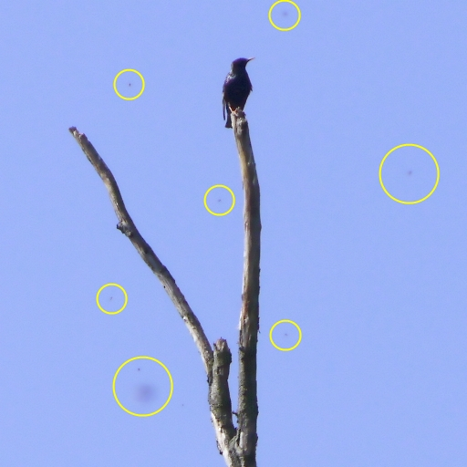 Dunkle Geisterflecke durch Fluginsekten in verschiedenen Objektweiten, die das Himmelsblau absorbieren und unscharf abgebildet werden.